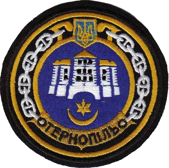 (U209) Тернопіль. Емблема корвету «Тернопіль» Військово-Морських Сил Збройних Сил України (варіант 1)